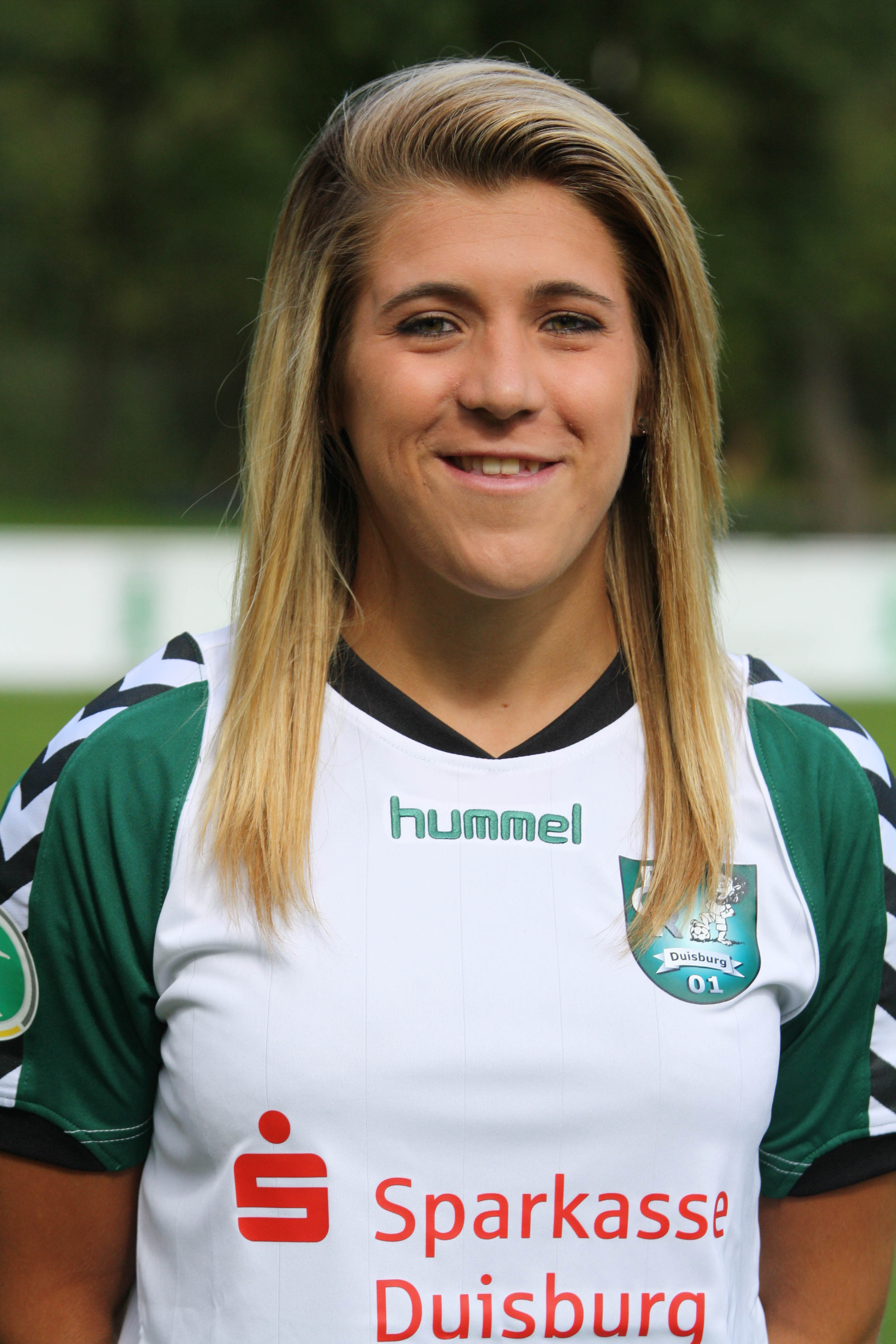 Luisa Wensing, FCR 2001 Duisburg, Saison 2011/12